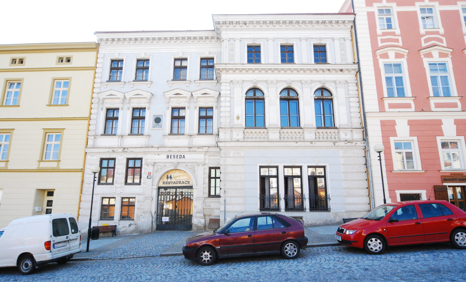 Das Beseda-Haus am Masaryk náměstí in Znojmo als Sitz des ersten tschechischen Vereins in Znaim